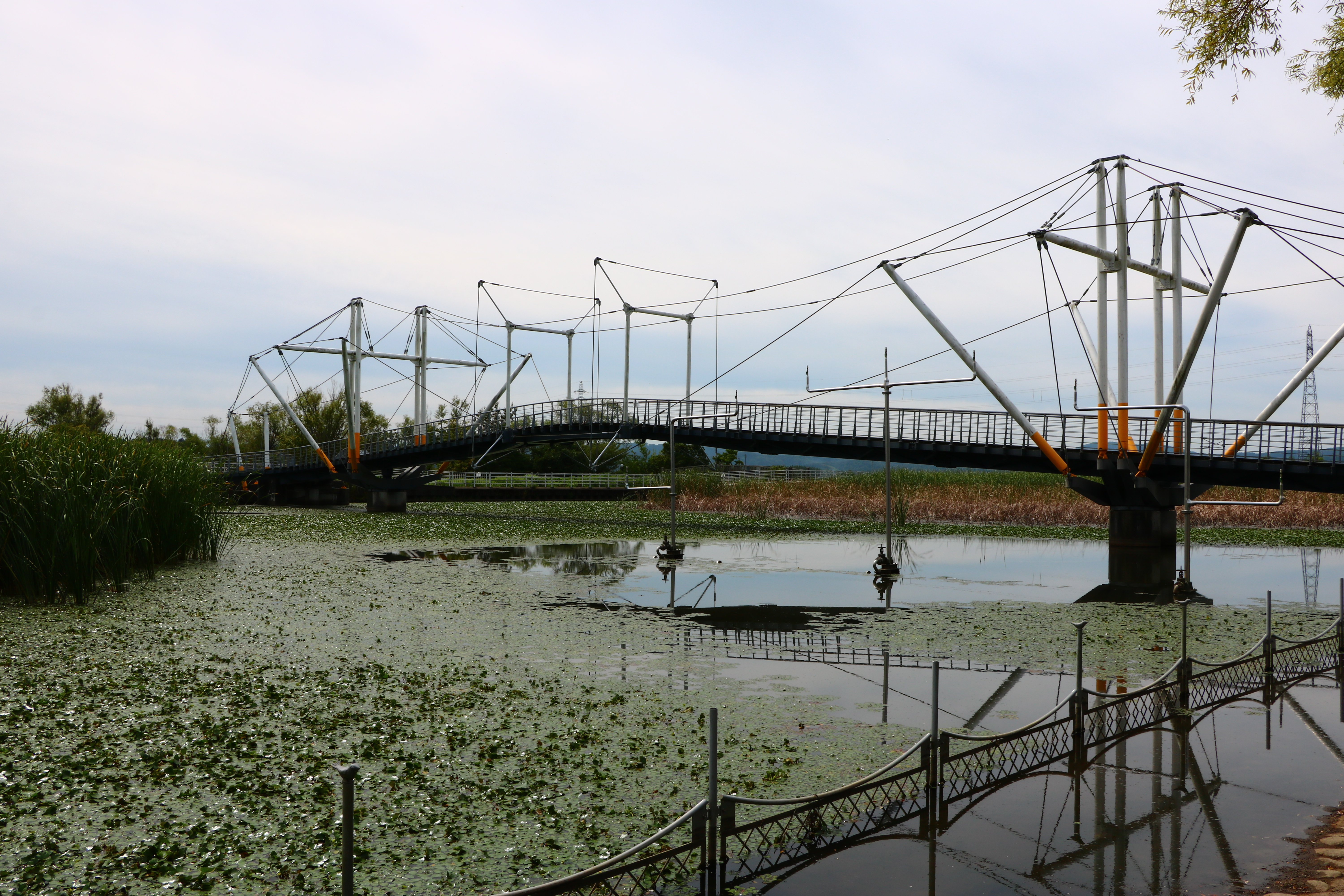 十二町潟（富山県氷見市）